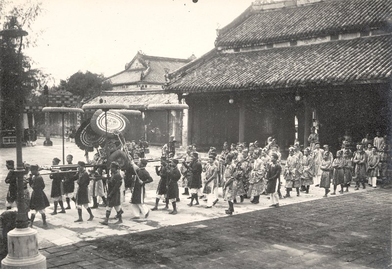 Fête d'intronisation de sa majesté Bao Dai - sortie de cortège.